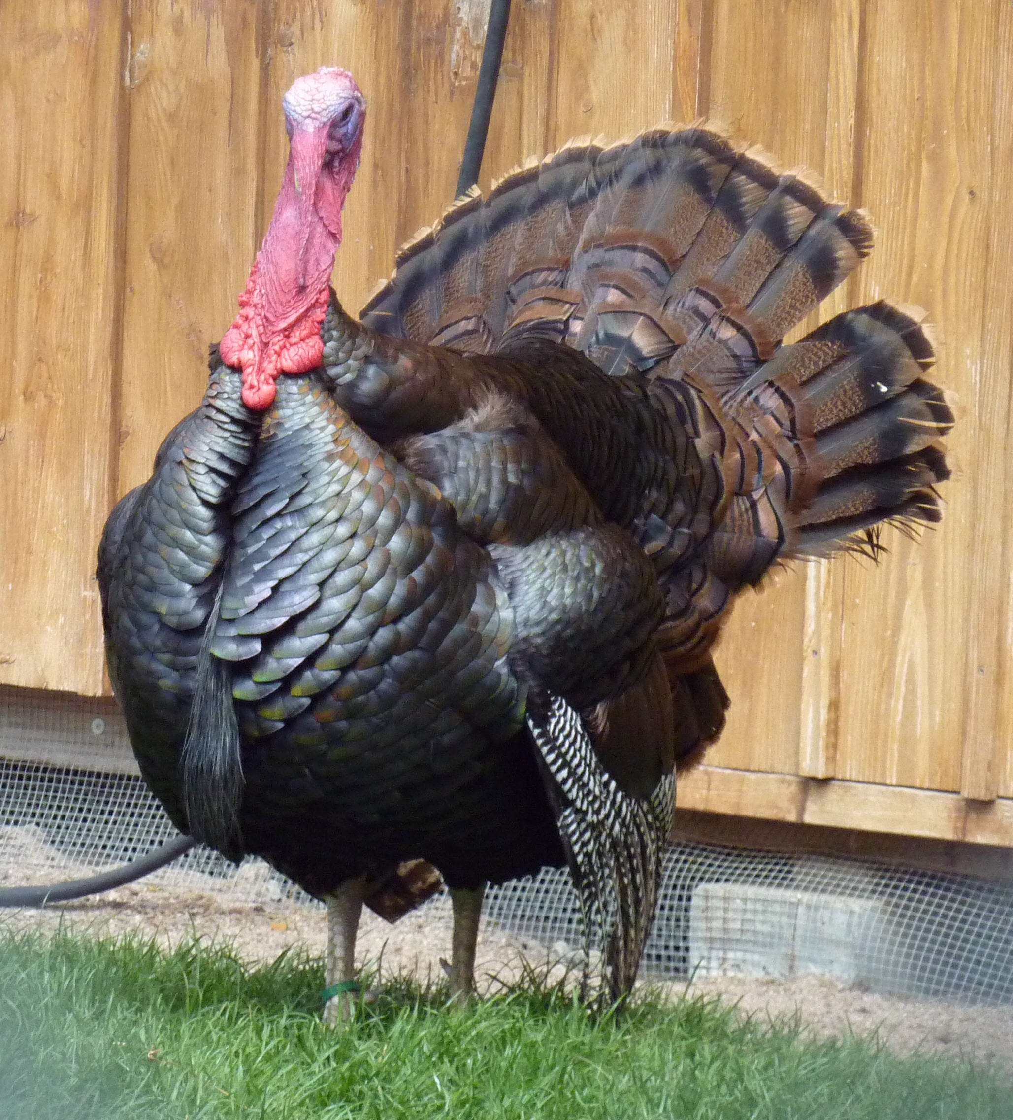 Truthahn im Schaubauernhof der Wilhelma